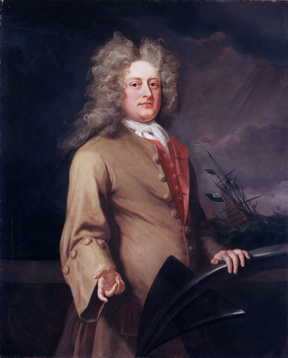 Rear-Admiral Basil Beaumont (1669-1703)